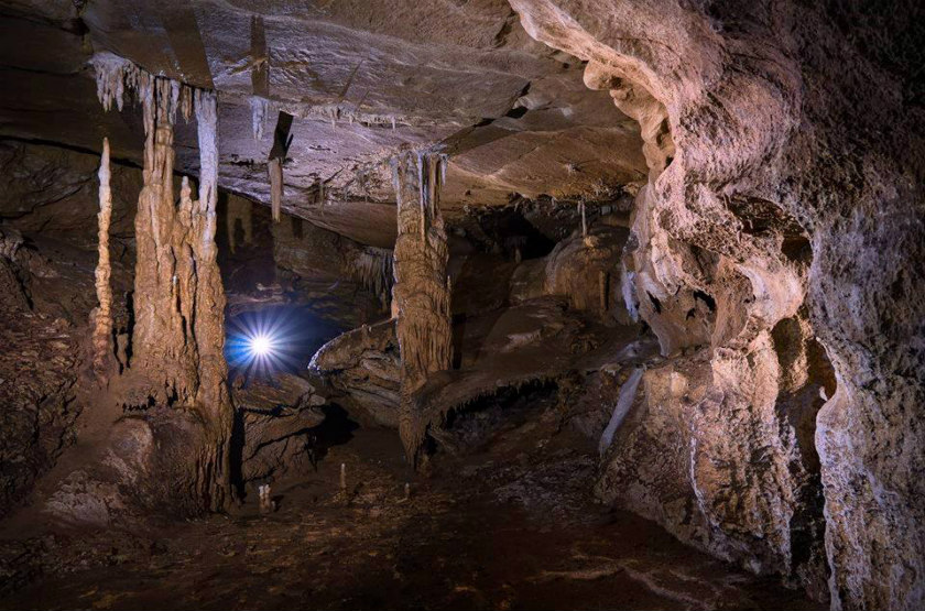 Slika